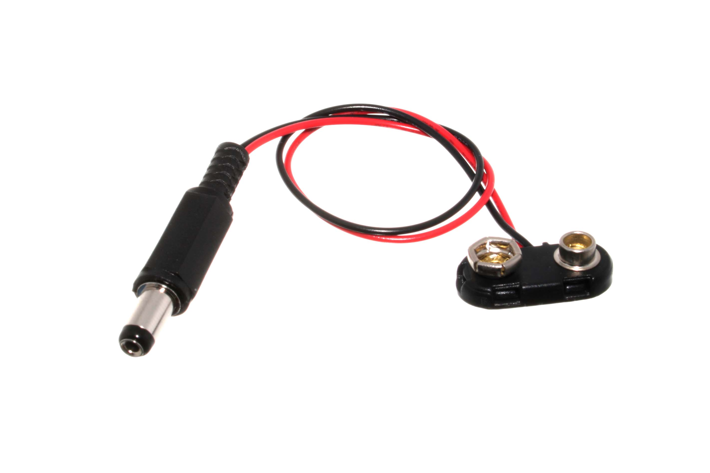 9 volt battery snap to 2.1 mm DC adapter.